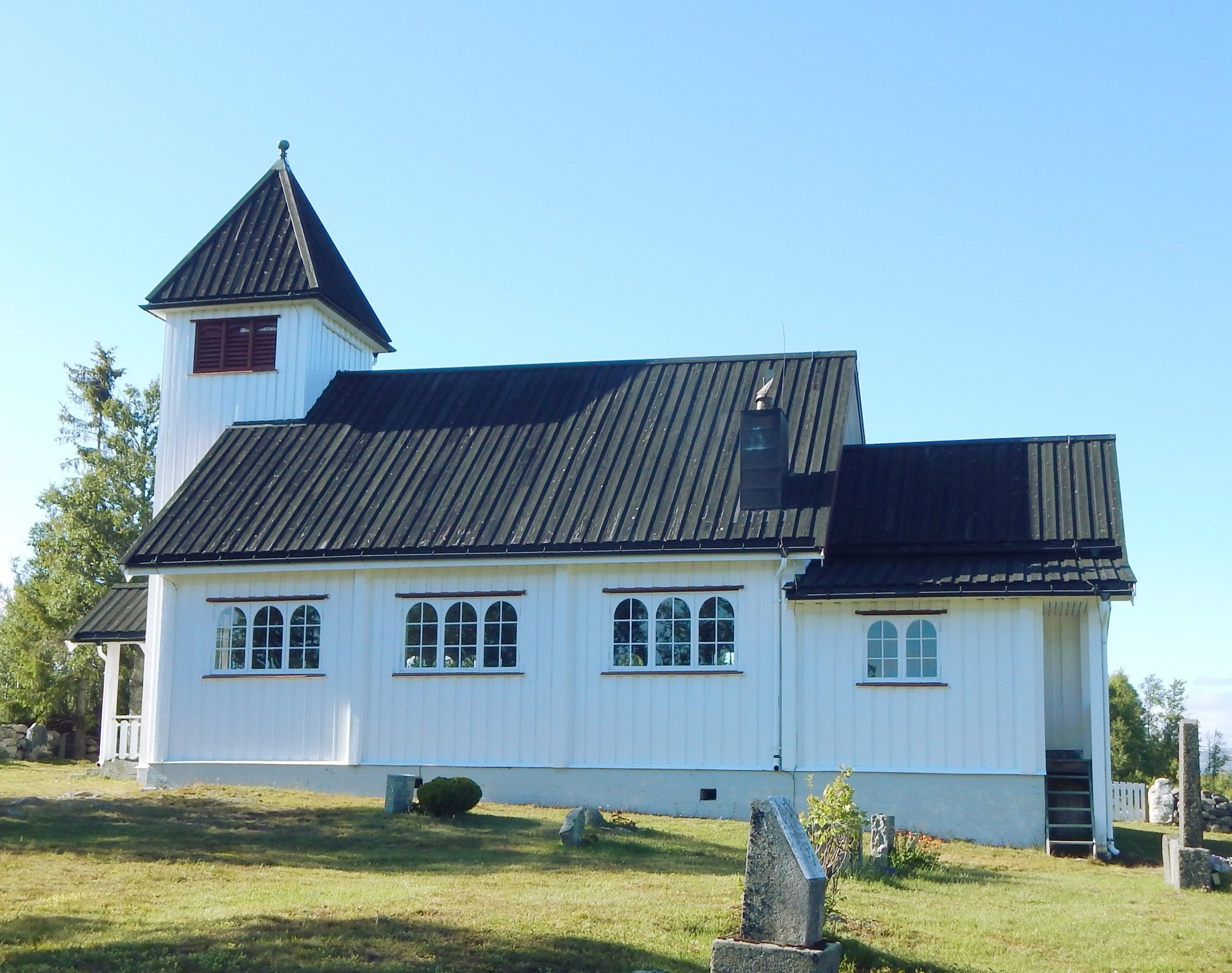 Møsstrond kirke